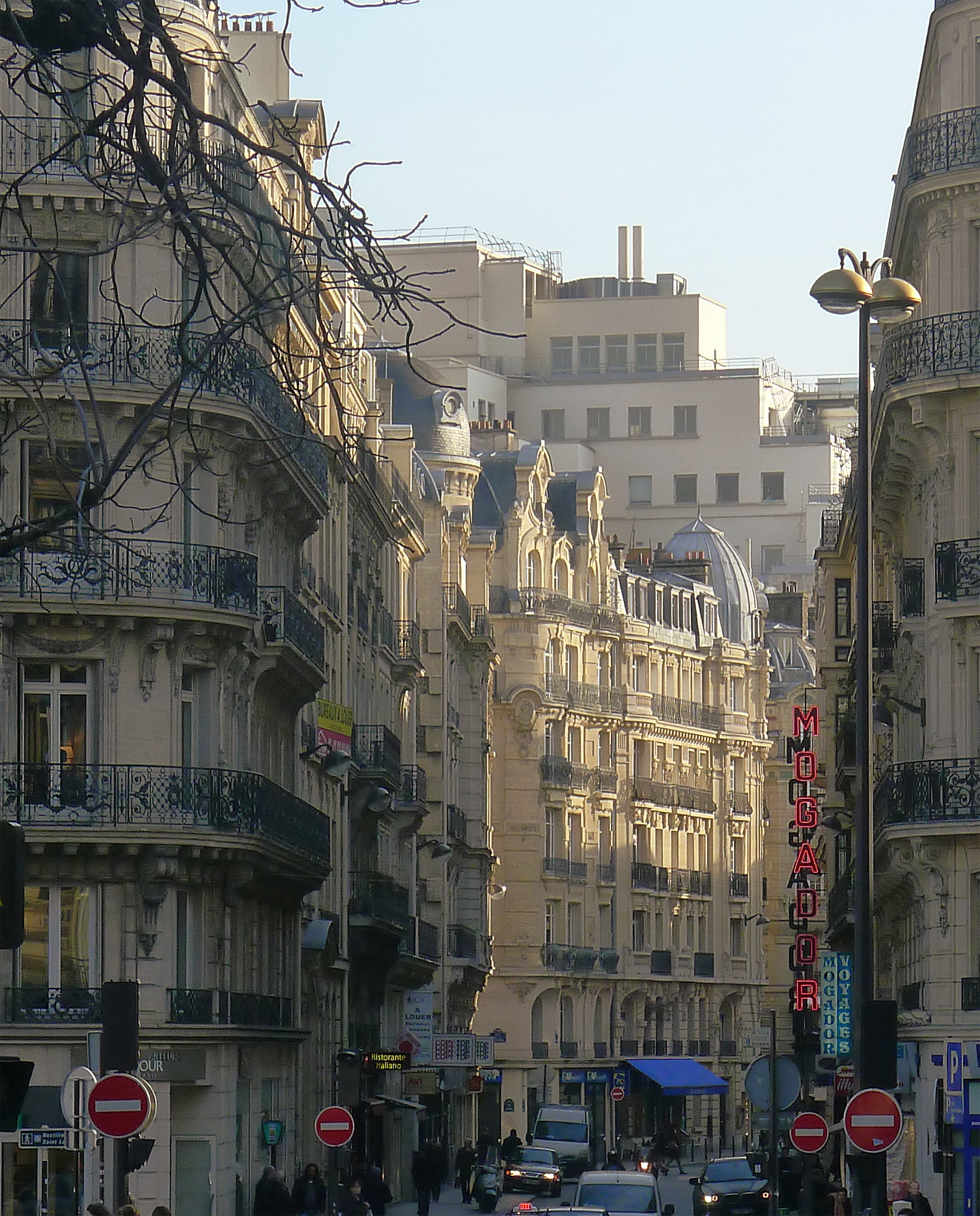 Rue de Mogador - Paris IX